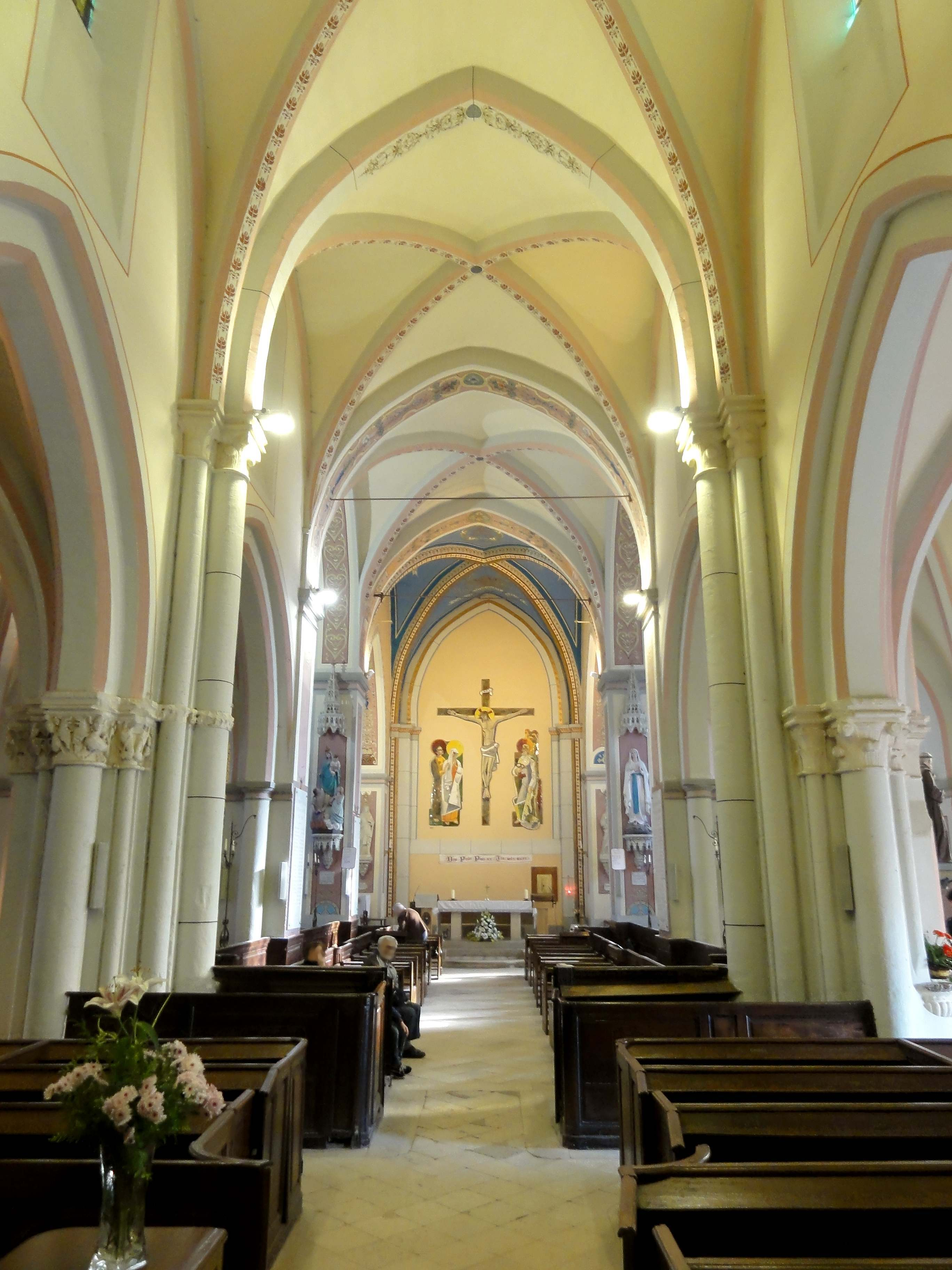 Nef, vue vers l'est.